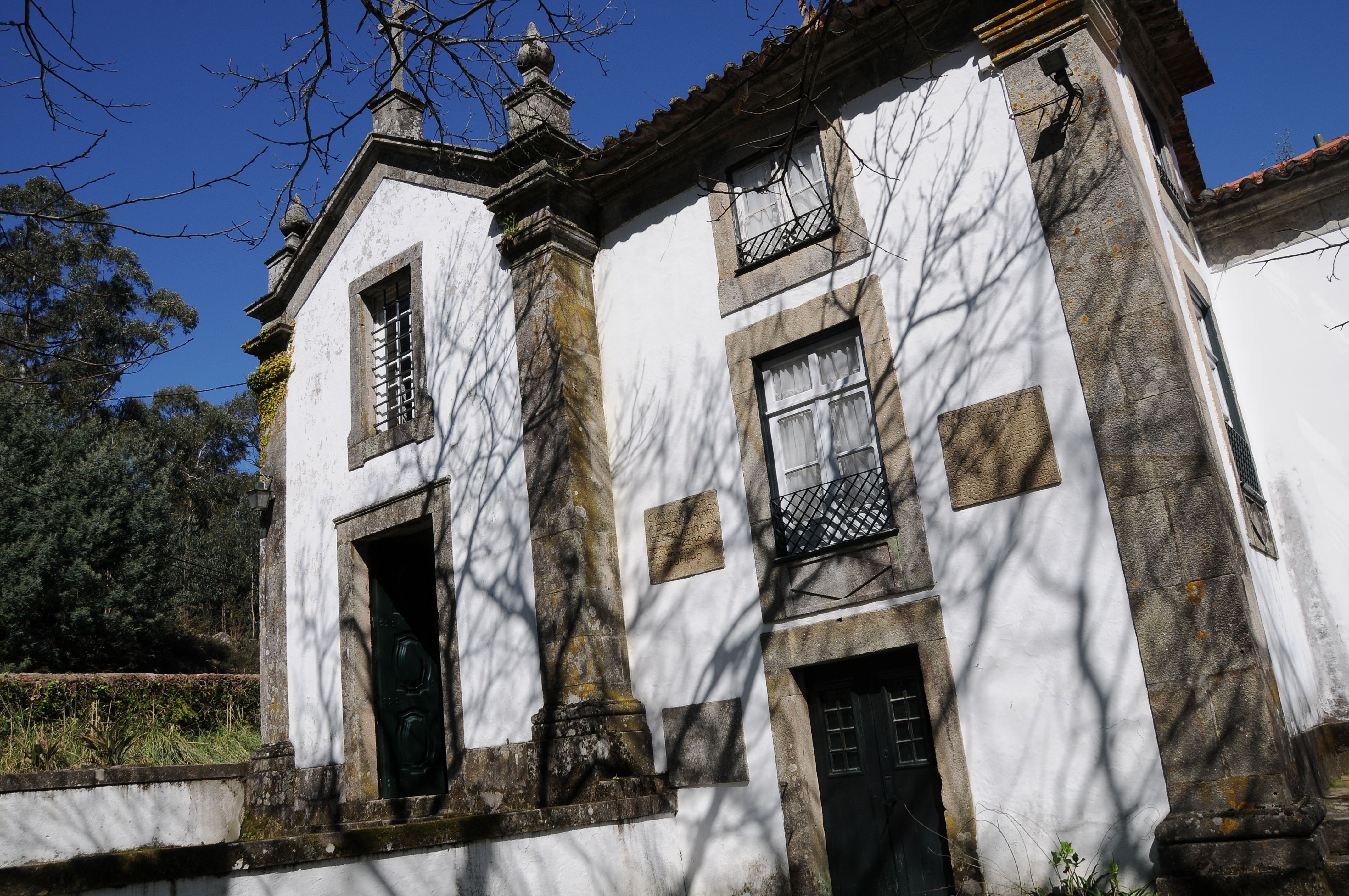 Outeiro House in Arcozelo, Ponte de Lima, Portugal.